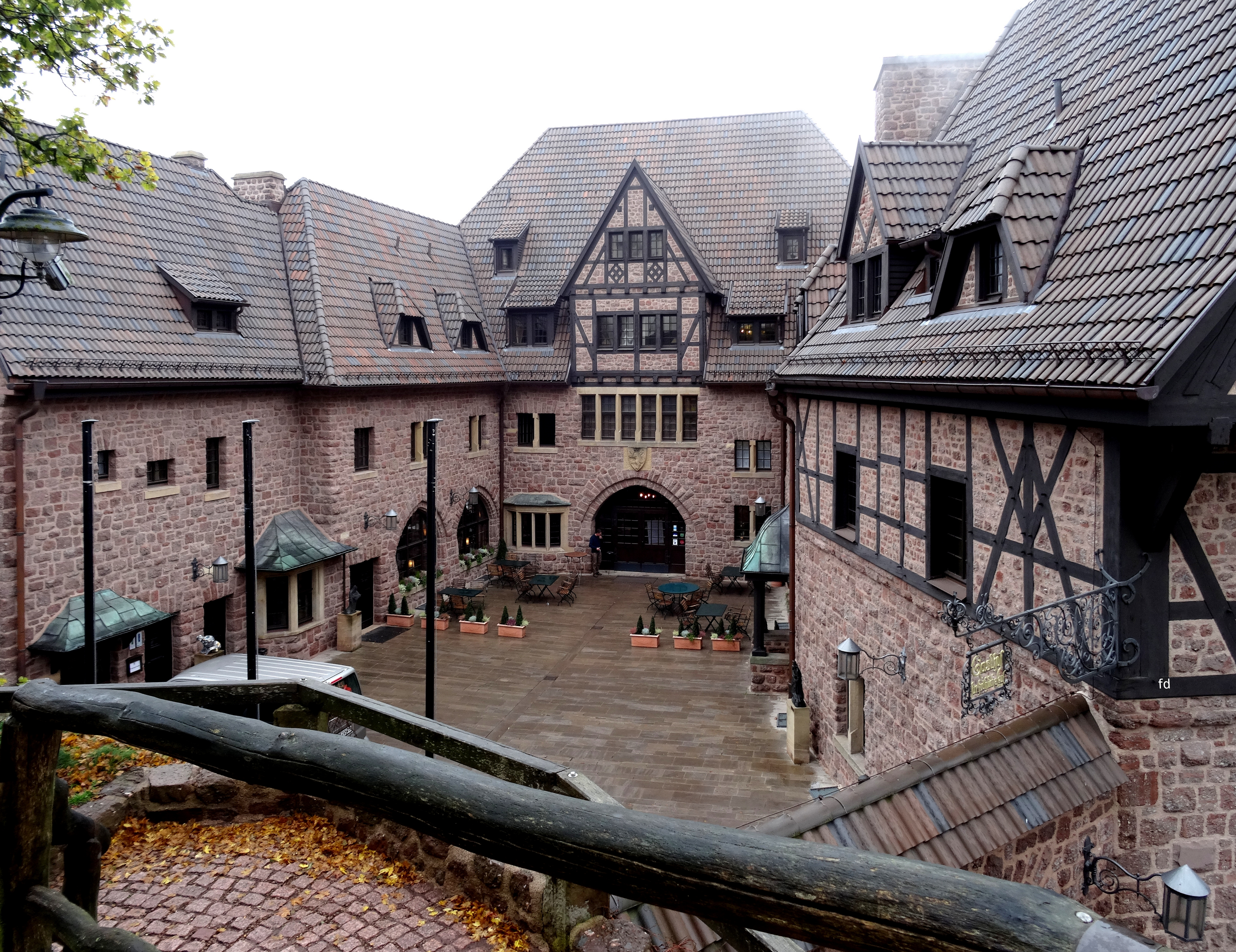 Wartburg der Gasthof